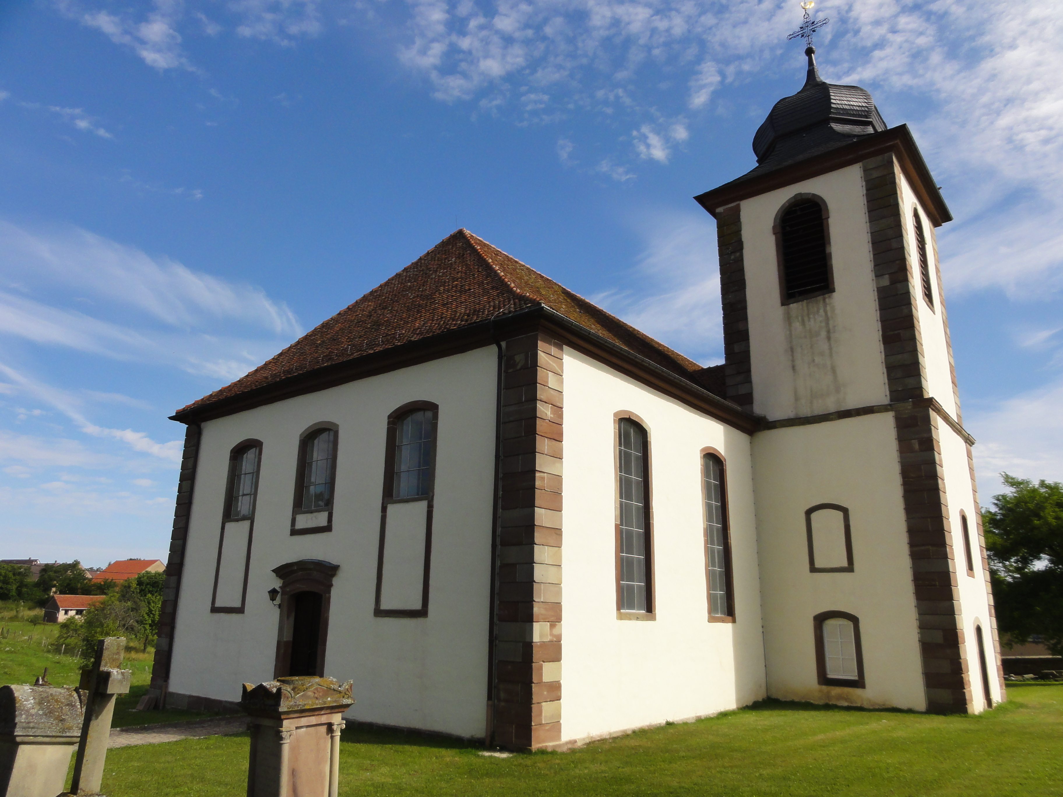 Alsace, Bas-Rhin, Église protestante de Berg (PA00084611, IA67000743).